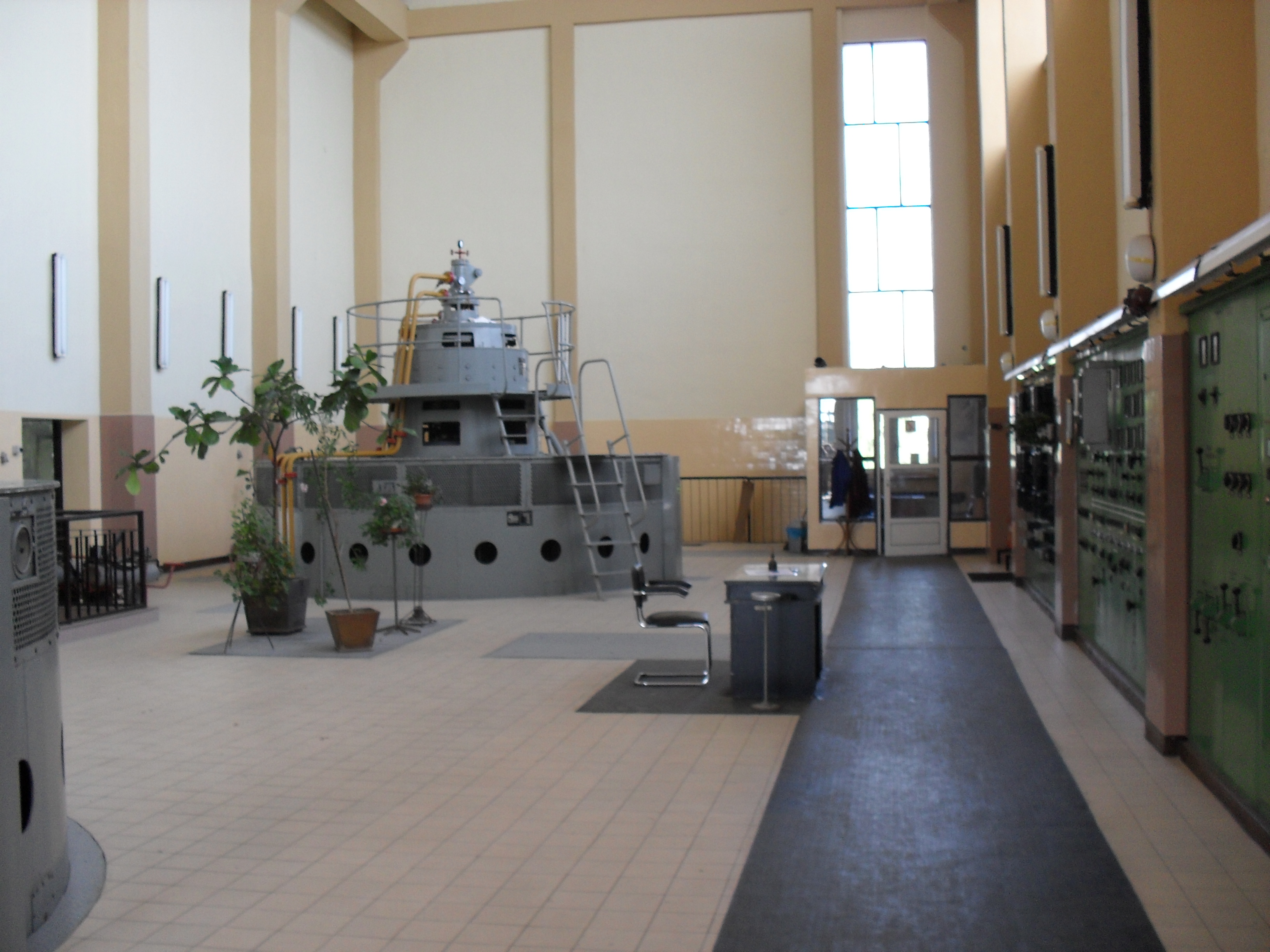 Hydrogeneratory - elektrownia stopień wodny Dąbie (Kraków)